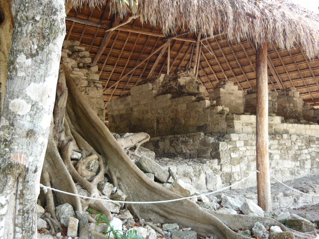 Estructura maya de los Murales, San gervasio, Cozumel, Quintana Roo, México.